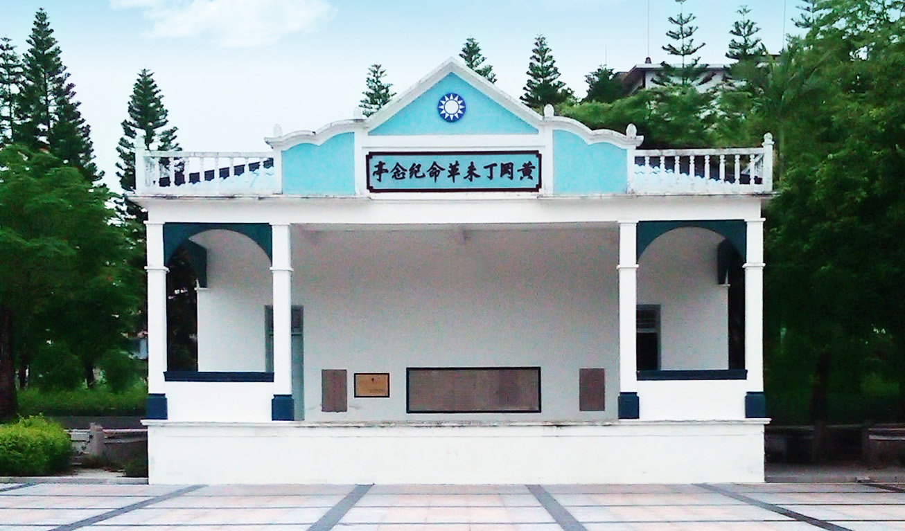 饒平縣中山公園丁末革命紀念亭